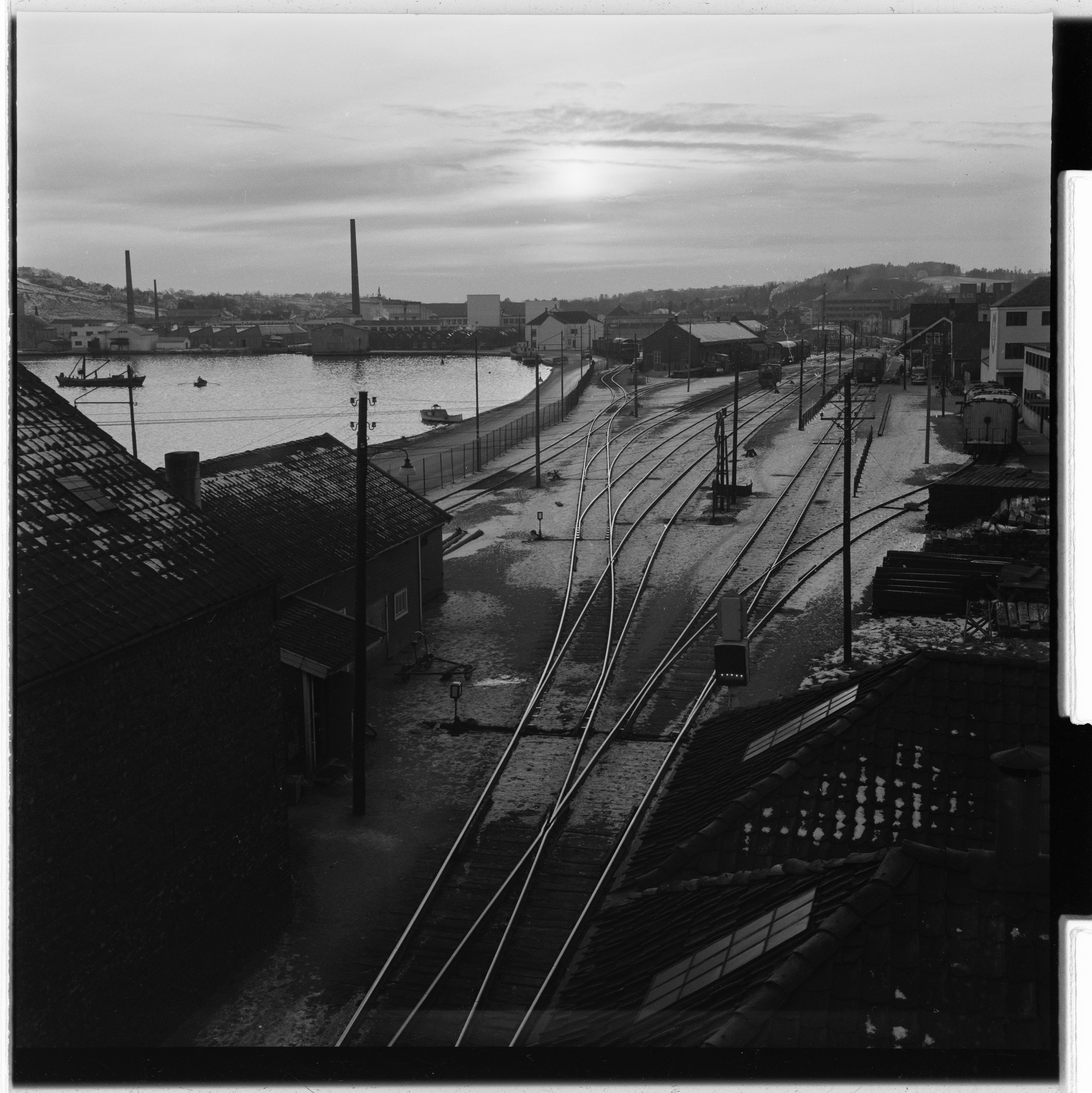 Bildet er hentet fra Arkivverket. Jernbanelinja i Sandnes. Foto tatt i forbindelse med reportasje om Ganns Potteri & Teglverk i Sandnes. NÅ nr. 6, 1953 Arkivinstitusjon : Riksarkivet Arkivnavn : Billedbladet NÅ Sted : Norge, Rogaland, Sandnes, Sandnes Emneord: Jernbane, Tog Avbildet: Ukjent